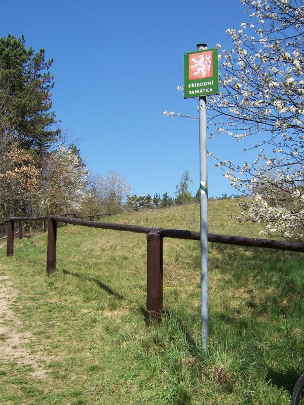 Praha, Pitkovice, přírodní památka Pitkovická stráň